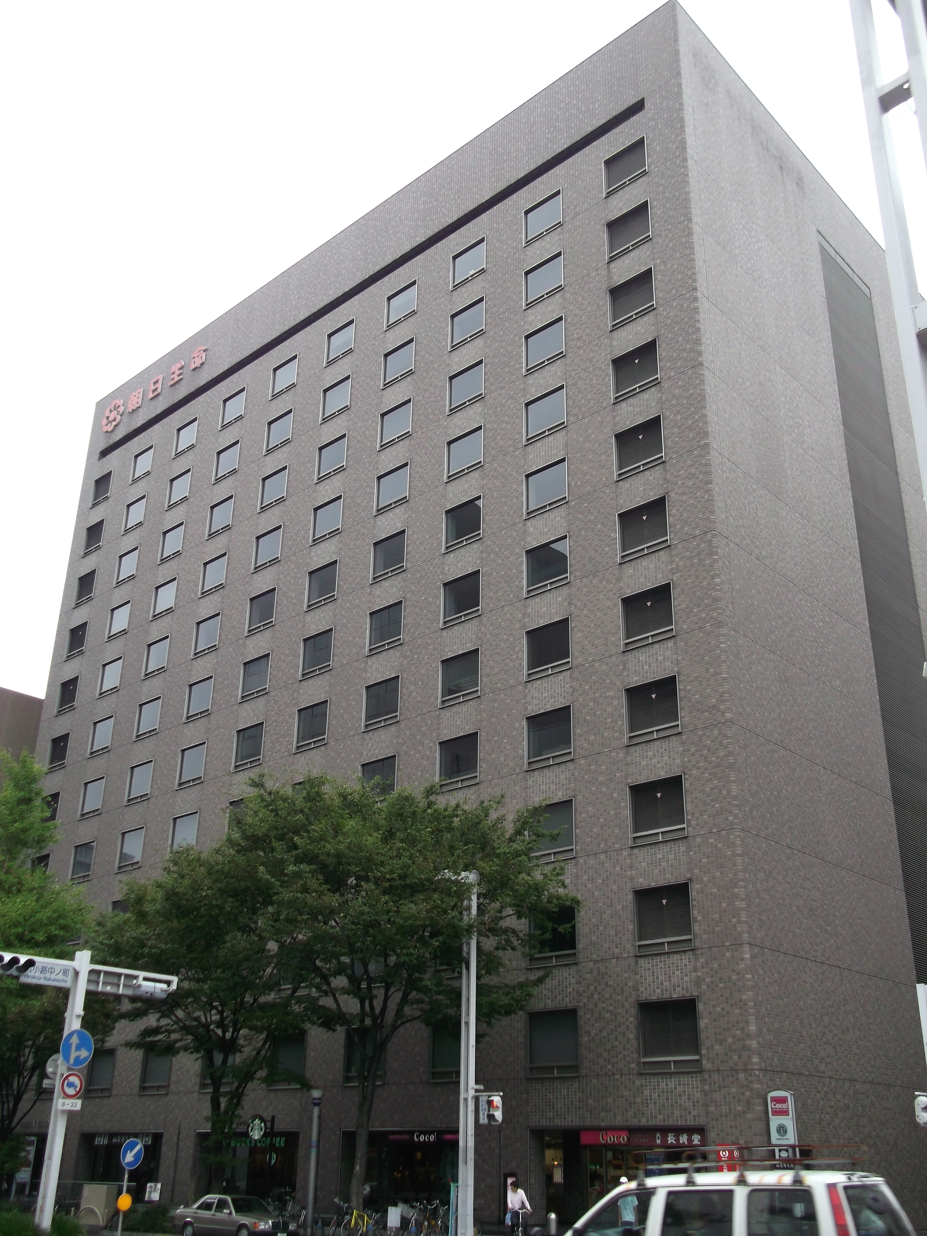 名古屋市中区丸の内の名古屋ATビルを南側公道東側より撮影